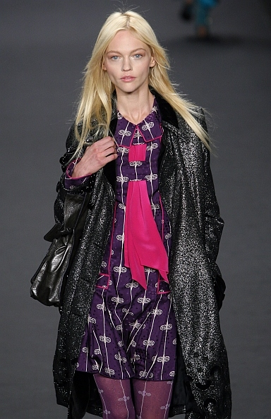 Sasha Pivovarova, Russian model, in Anna Sui